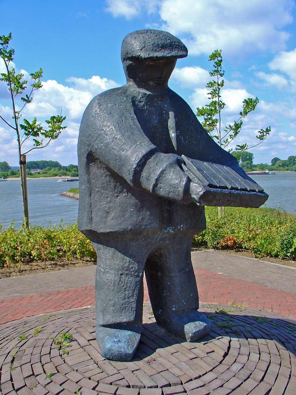 Monument voor het steenovenvolk in Spijk (Gelderland)